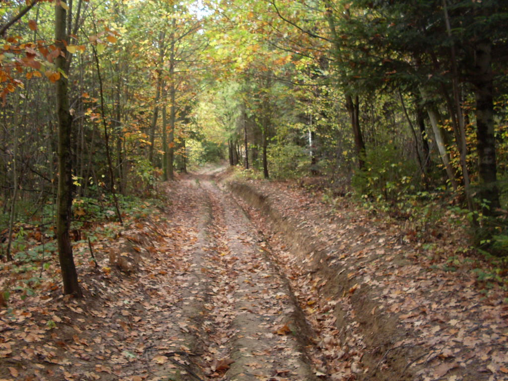 ліс: осінь в лісі